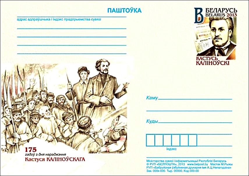 28 января 2013 года Министерство связи и информатизации Республики Беларусь выпустило в обращение карточку с оригинальной маркой «175 лет со дня рождения Кастуся Калиновского». Марка - портрет Кастуся Калиновского на фоне газет «Мужицкая правда»). Иллюстрация - выступление Калиновского перед крестьянами). Художник карточки и спецштемпеля - Микола Рыжий. Тираж 30 тыс. экземпляров. Специальное памятное гашение состоялось 2 февраля 2013 года на почтамте Минска.